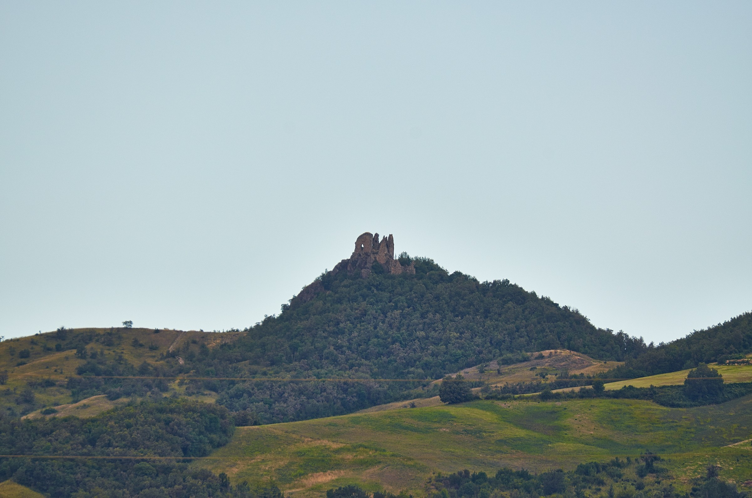 Ruderi del castello di Roccalanzona, telefoto